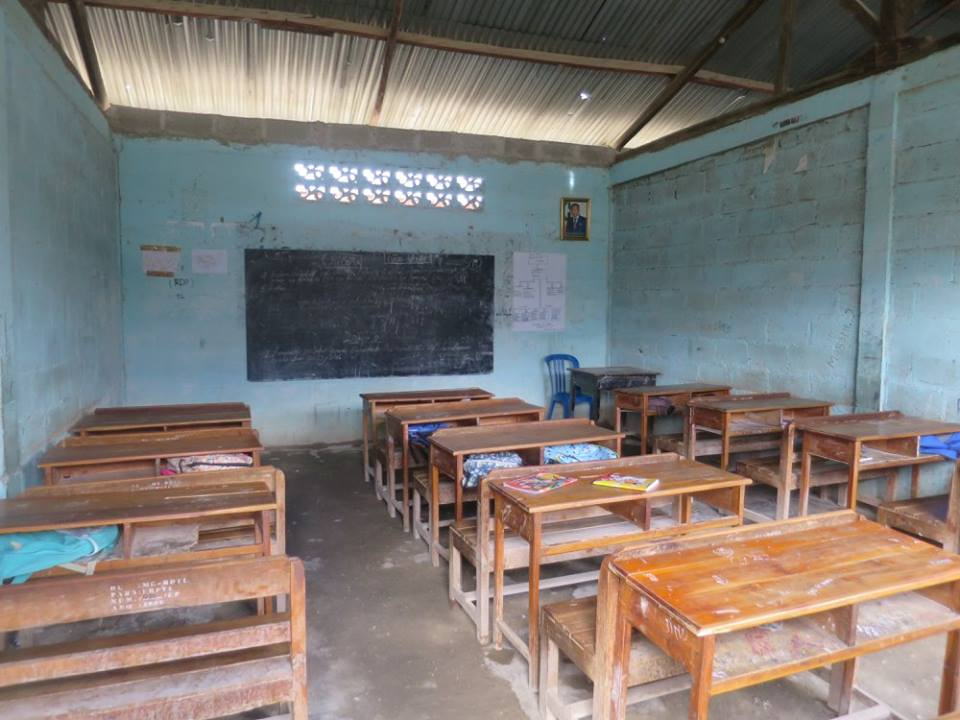 Escola Secundária Geral Rainha da Paz, Bebonuk, Comoro